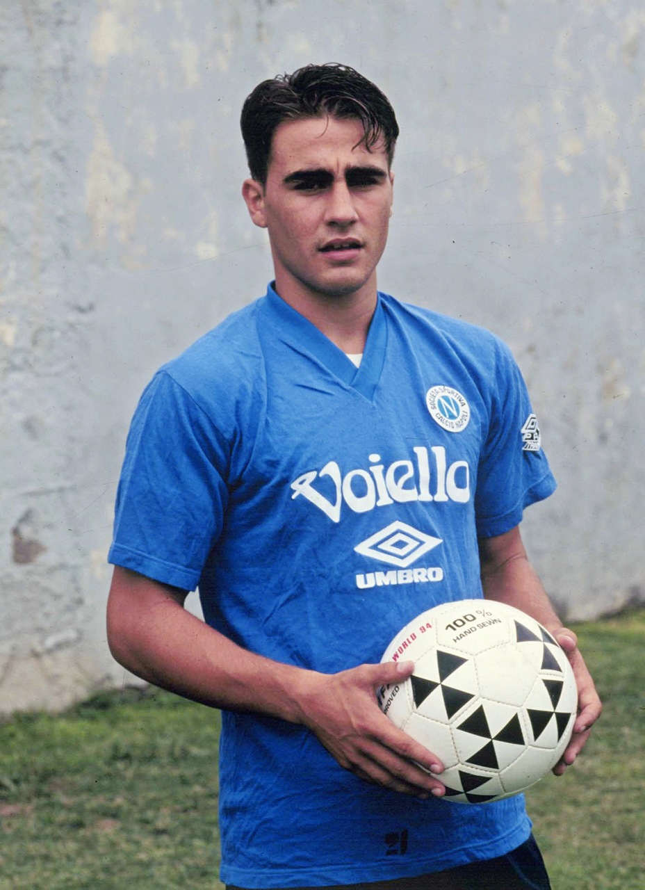 Fabio Cannavaro a 17 anni nelle giovanili del Napoli. Licensing Cannavaro, Fabio Cannavaro, Fabio